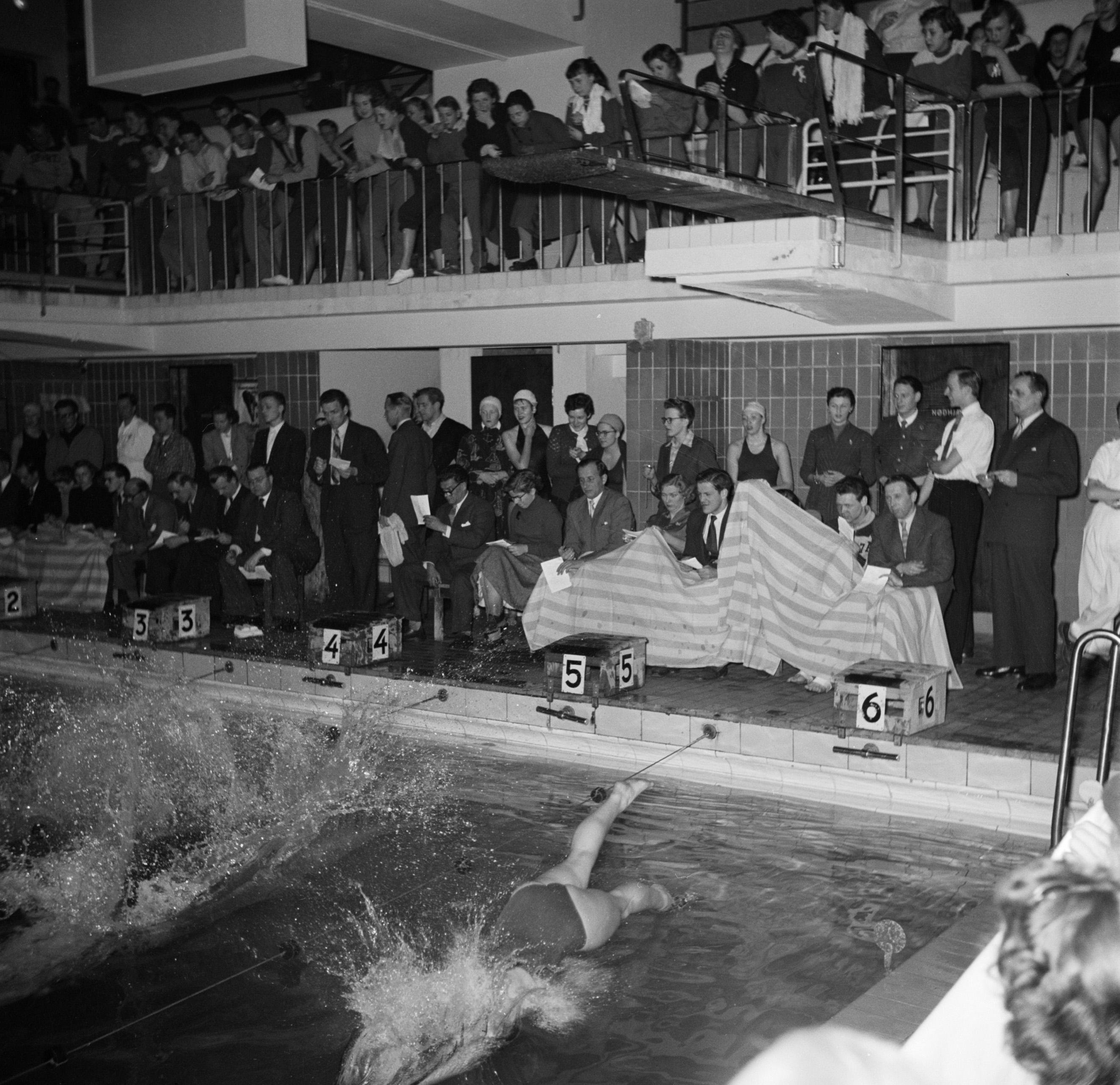 Collectie / Archief : Fotocollectie Van de Poll Reportage / Serie : Wedstrijden in het zwembad van Frederiksberg Beschrijving : Dames duiken in het water bij de Deense kampioenschappen in de zwemhal van Frederiksberg in Kopenhagen Datum : maart 1954 Locatie : Denemarken, Frederiksberg, Kopenhagen Trefwoorden : publiek, sportmanifestaties, supporters, wedstrijden, zwembaden, zwemmen Fotograaf : Poll, Willem van de, [onbekend] Auteursrechthebbende : Nationaal Archief Materiaalsoort : Negatief (zwart/wit) Nummer archiefinventaris : bekijk toegang 2.24.14.02 Bestanddeelnummer : 252-9253